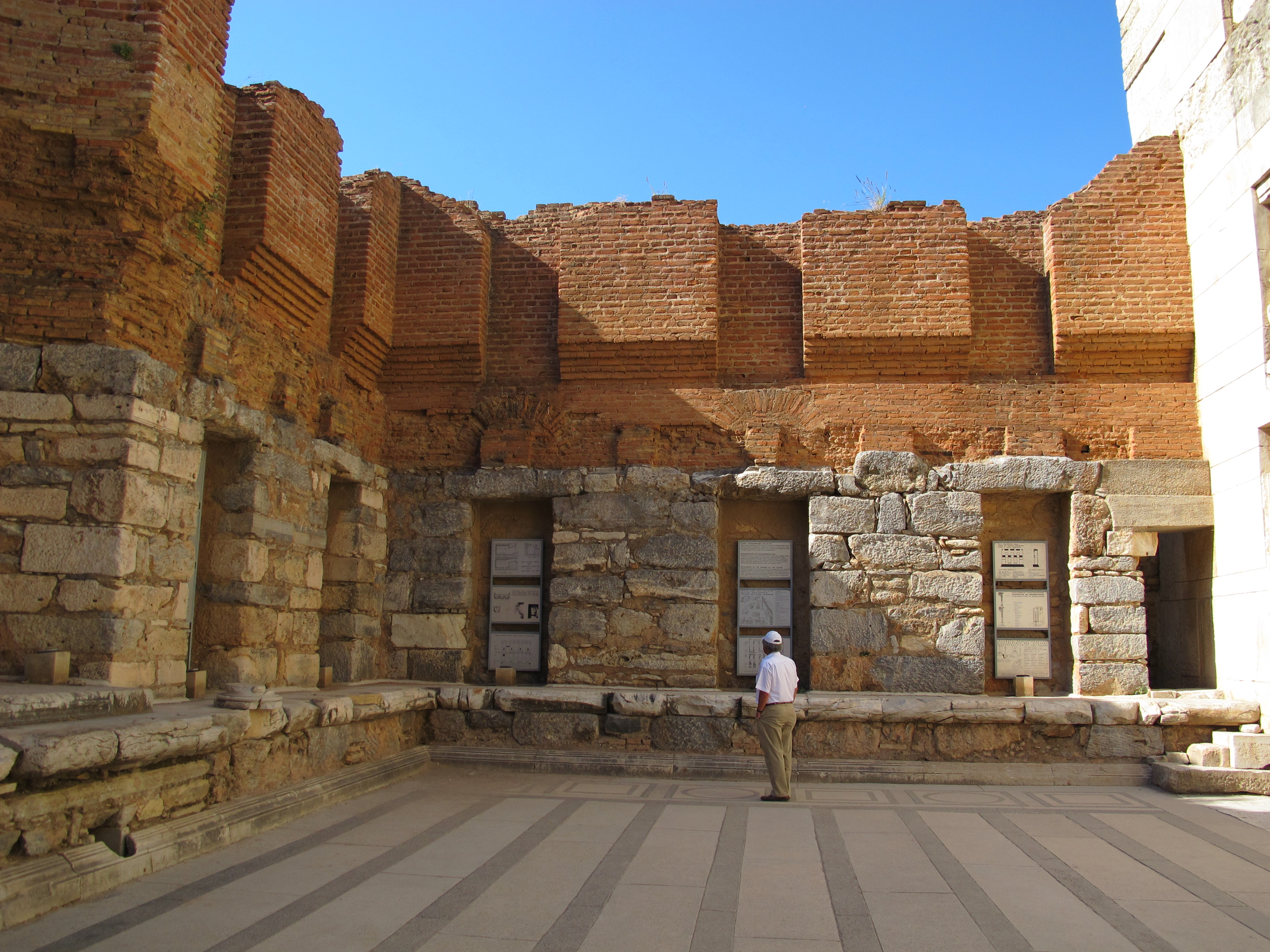 Efeso, biblioteca di celso, interno